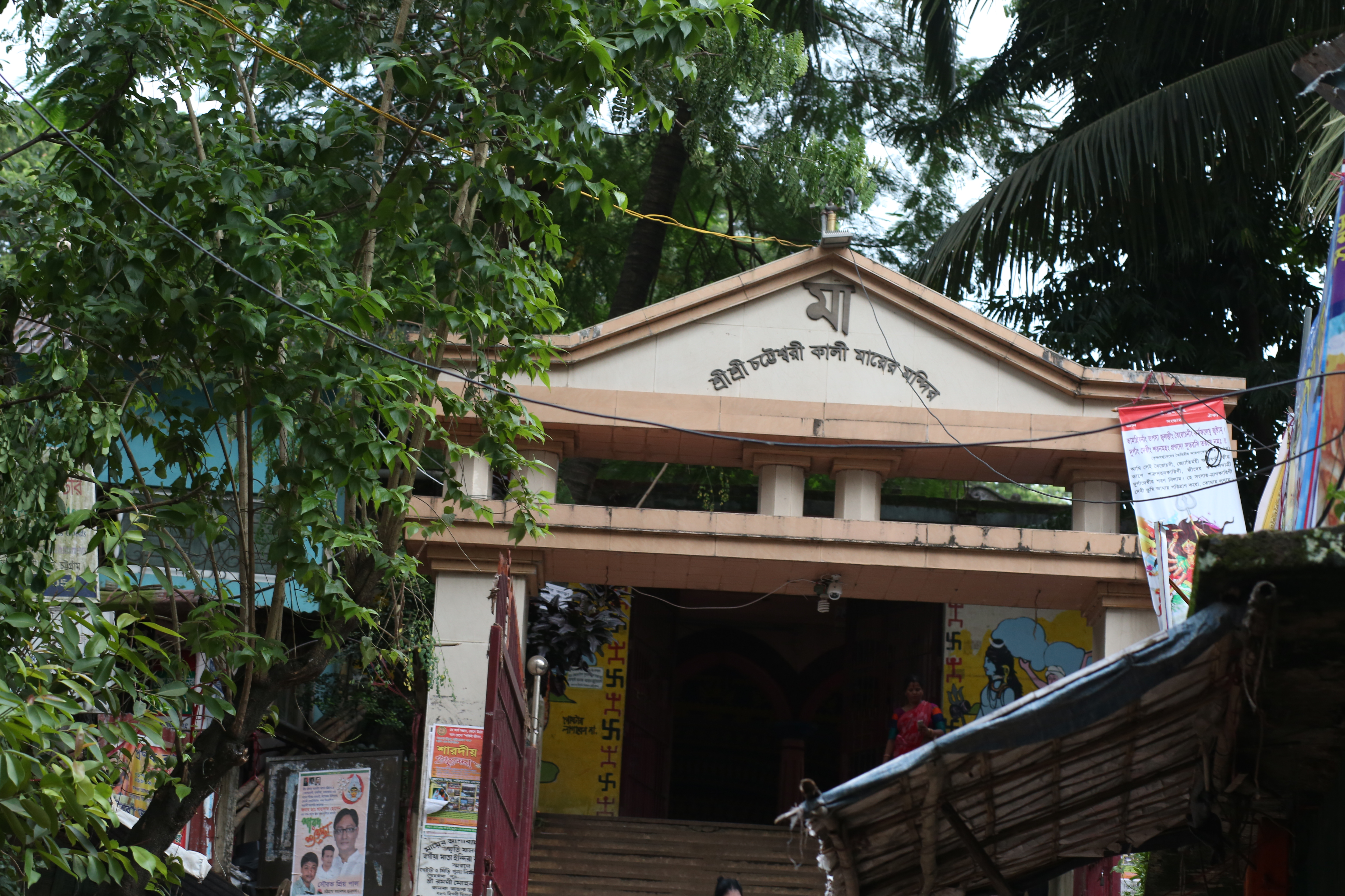 চট্টেশ্বরী মন্দির